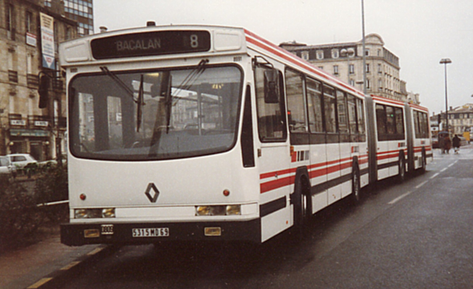 Seul Mégabus construit par RVI, il a été testé dans de nombreux réseaux.